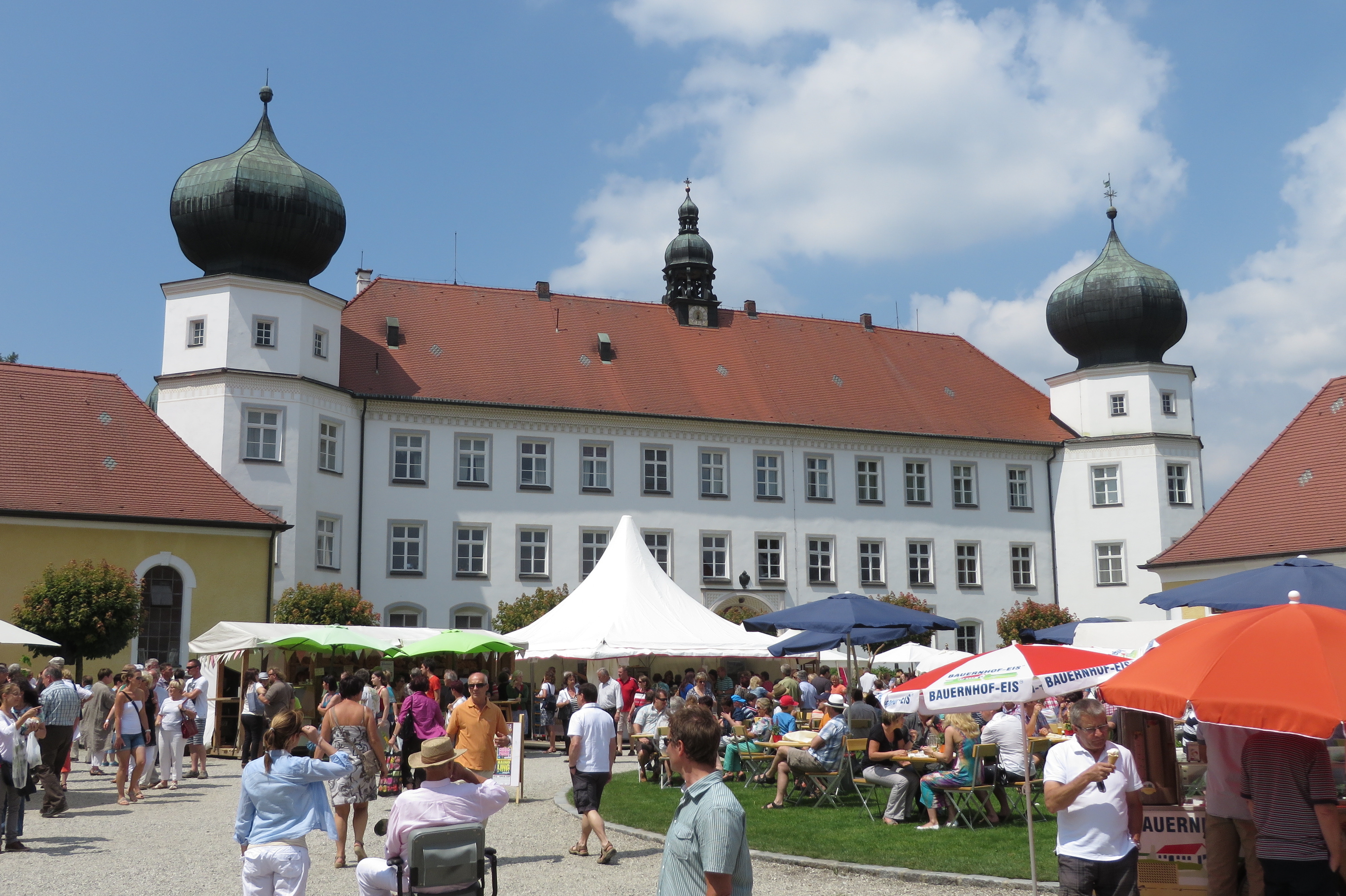 Gartentage auf Schloss Tüßling vom 5.–7. Juli 2013